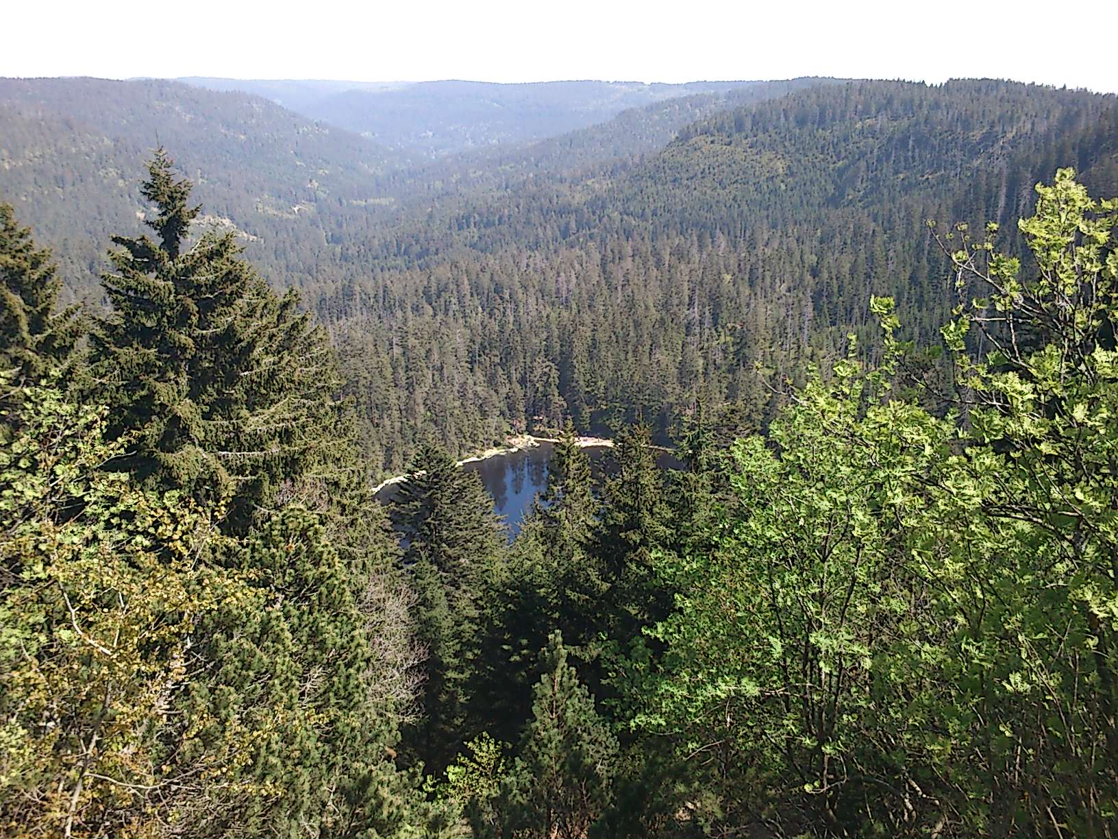 Wildseeblick vom Seekopf im Nationalpark Schwarzwald, Bannwald und Naturschutzgebiet Wilder See - Hornisgrinde